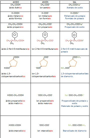 NOMENCLATURA DE SALES ACIDAS